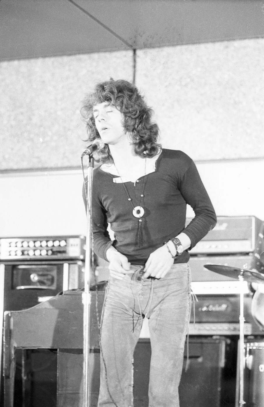 in der Neuen Mensa der Christian-Albrechts-Universität (CAU).